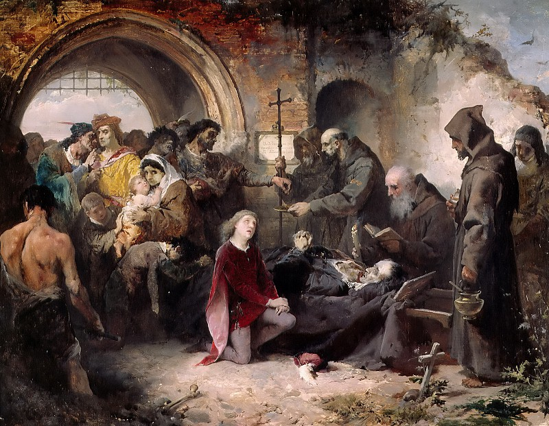 Похороны констебля дона Альваро де Луна. Музей Прадо